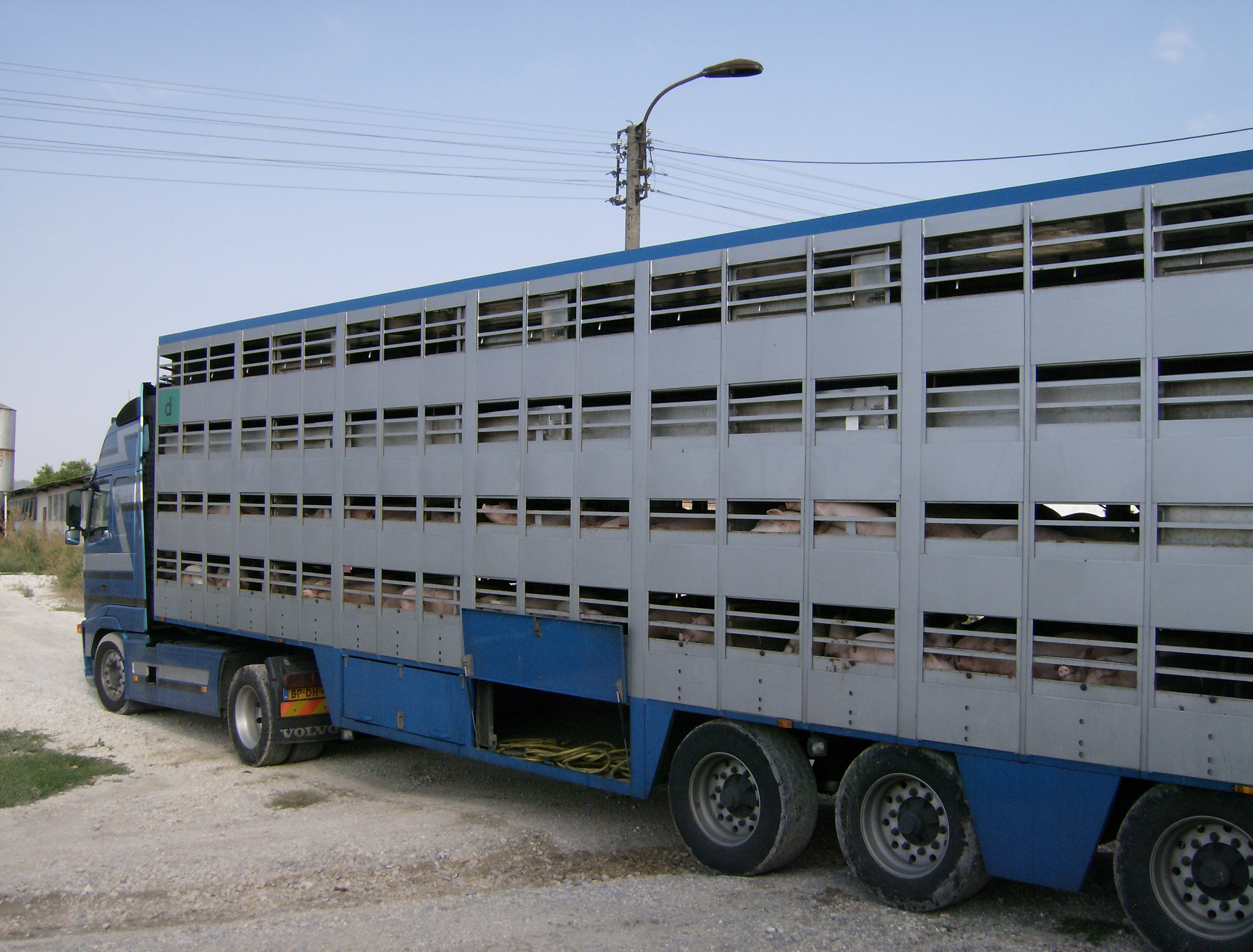 камион за превоз на животни